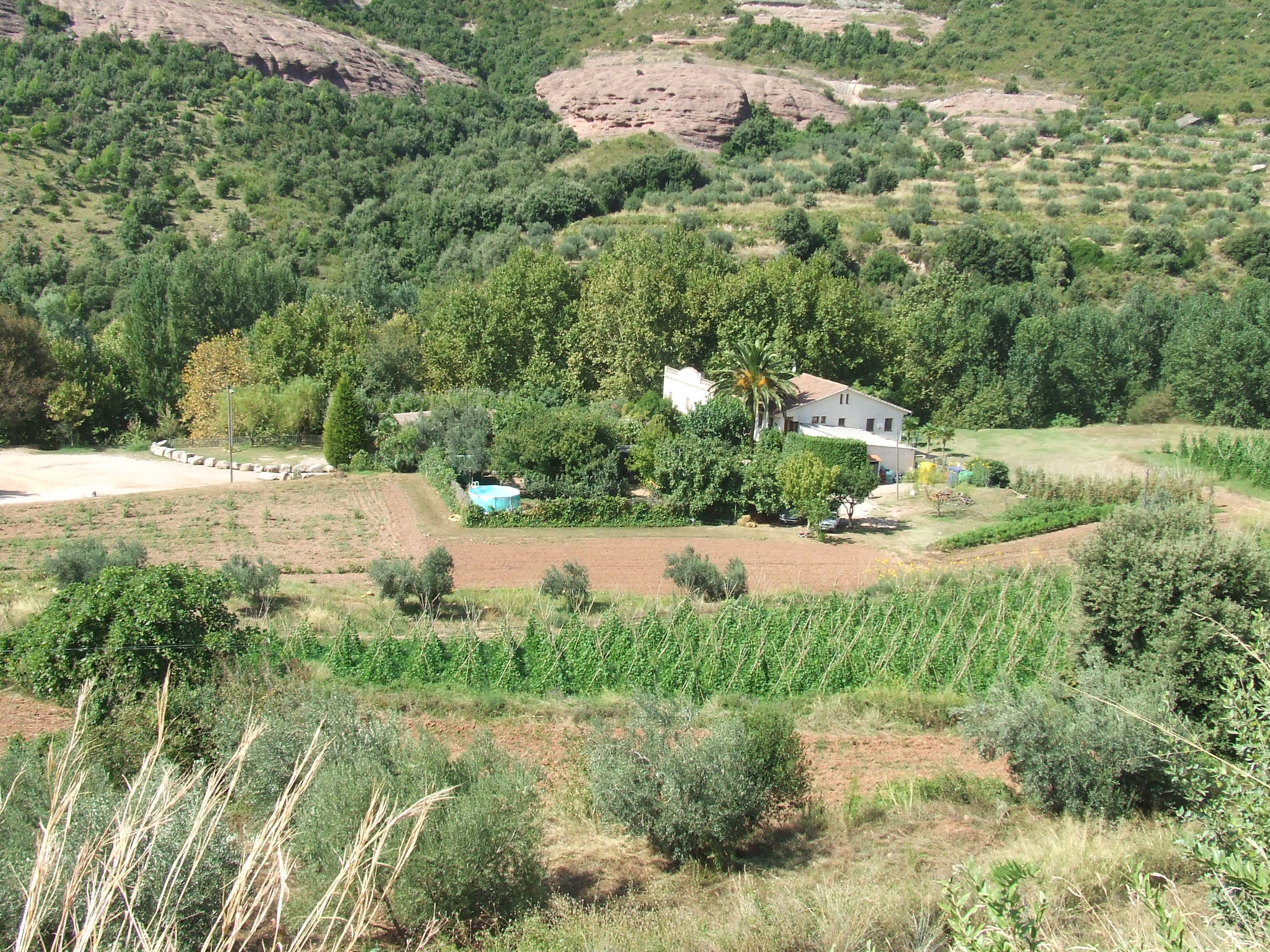 Vinyes de la Pineda i la Font de la Pineda (Riells del Fai, Bigues i Riells, Vallès Oriental)